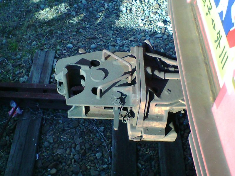 中間連結器 トムリンソン→自動連結器 撮影車両：銚子電気鉄道 デハ1002 デハ1001/デハ1002については、時期により有蓋貨車を改造したオープン遊覧車「澪つくし号」を連結するため、常に中間連結器を装着した状態で運用されている場合がある。